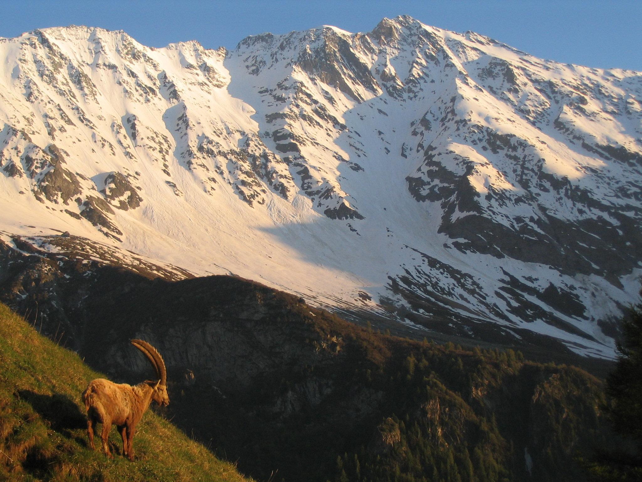 Face nord du Bellecôte (Vanoise) avec bouquetin. Juin 2006 Licensing Catégorie:Sommet des Alpes françaises Catégorie:Massif de la Vanoise catégorie:montagne